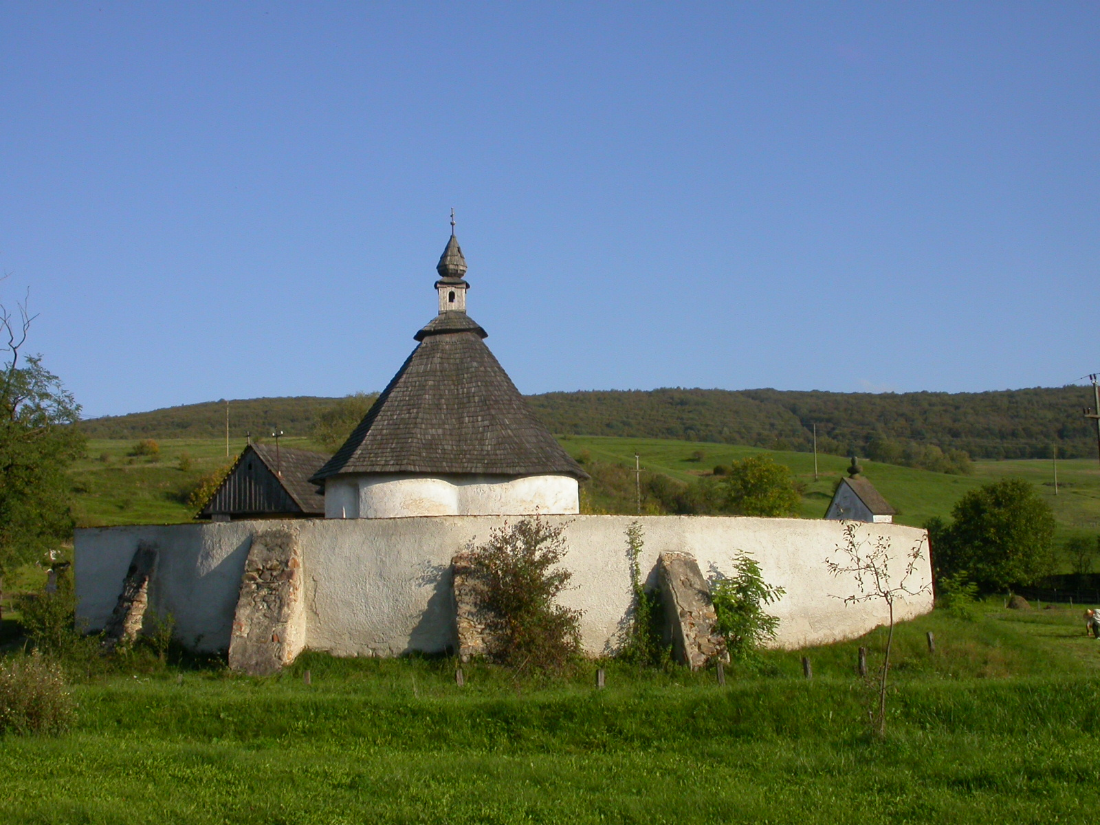 Ansamblul capelei romano-catolice "Inima lui Iisus", sec. XIII - XVI